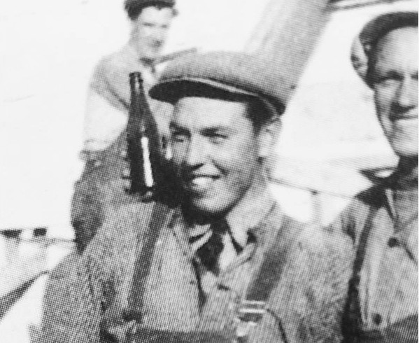 John Mattson som ung byggarbetare